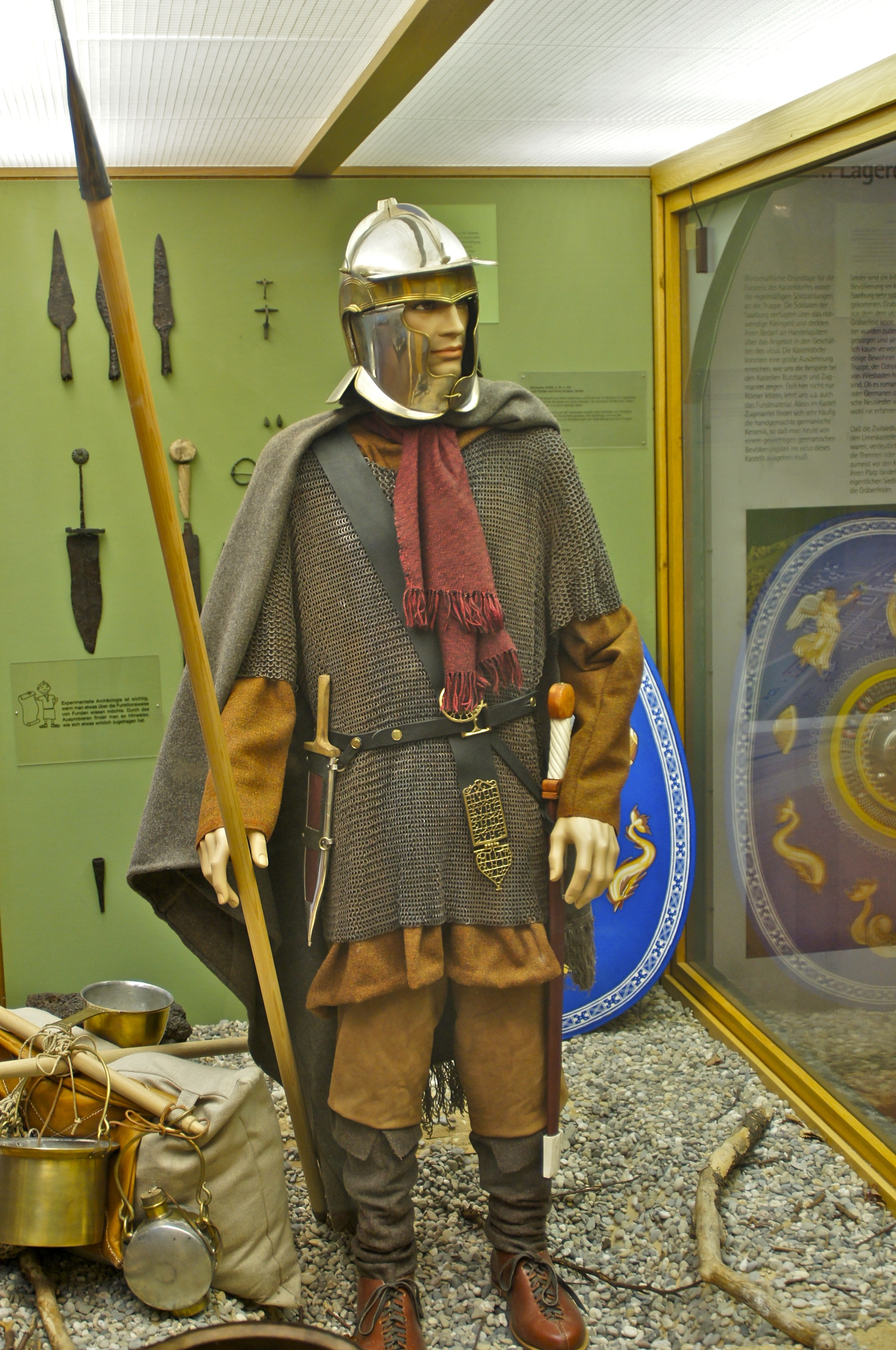 Römischer Soldat